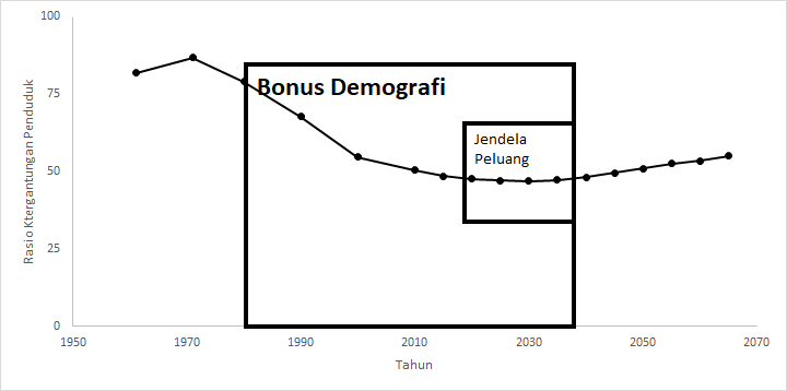 Rasio Ketergantungan (Dependency Ratio) Penduduk Indonesia